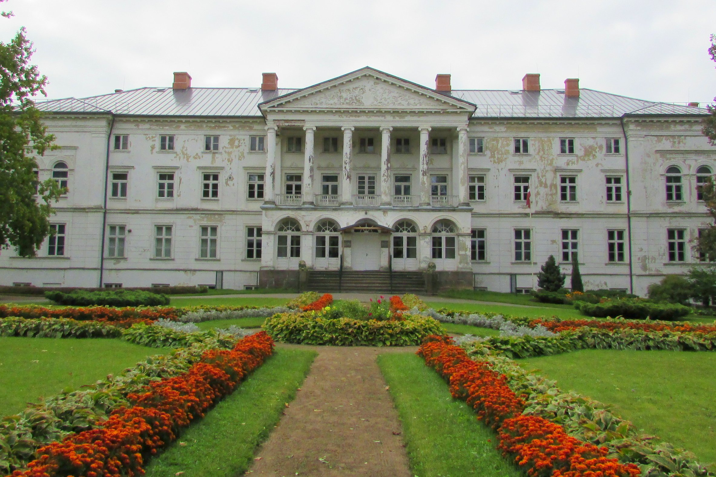 Jaunā pils, Gaujienas pagasts